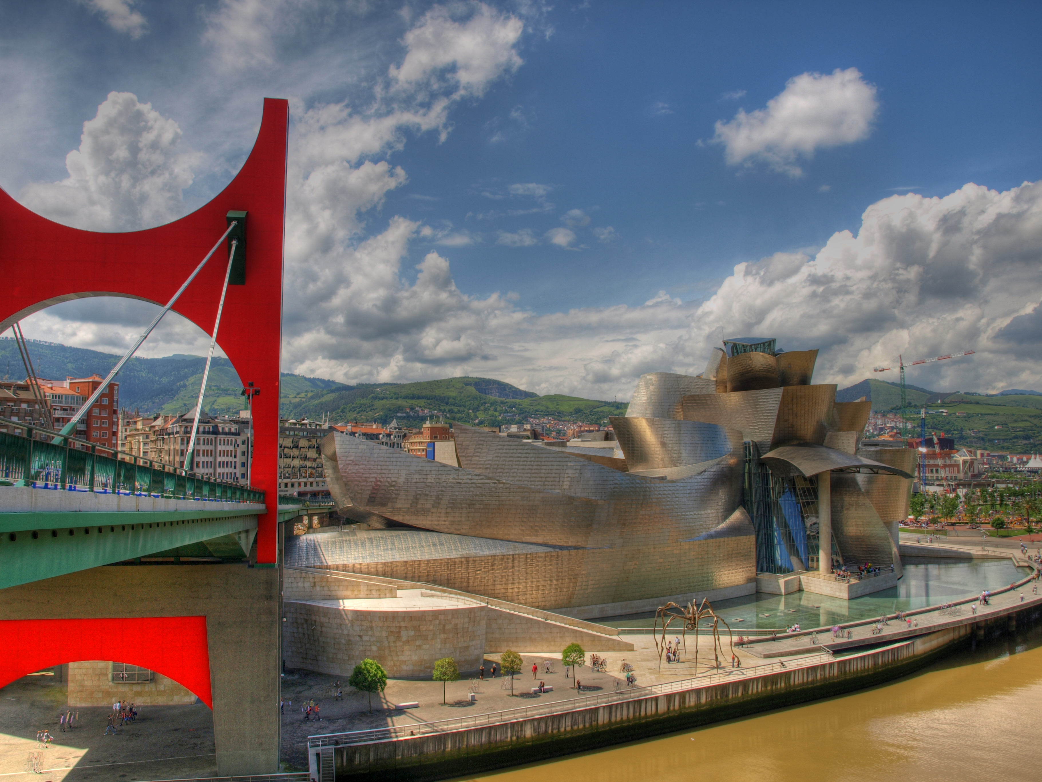 Museo Guggenheim de Bilbao con el puente de la Salve en primer plano.